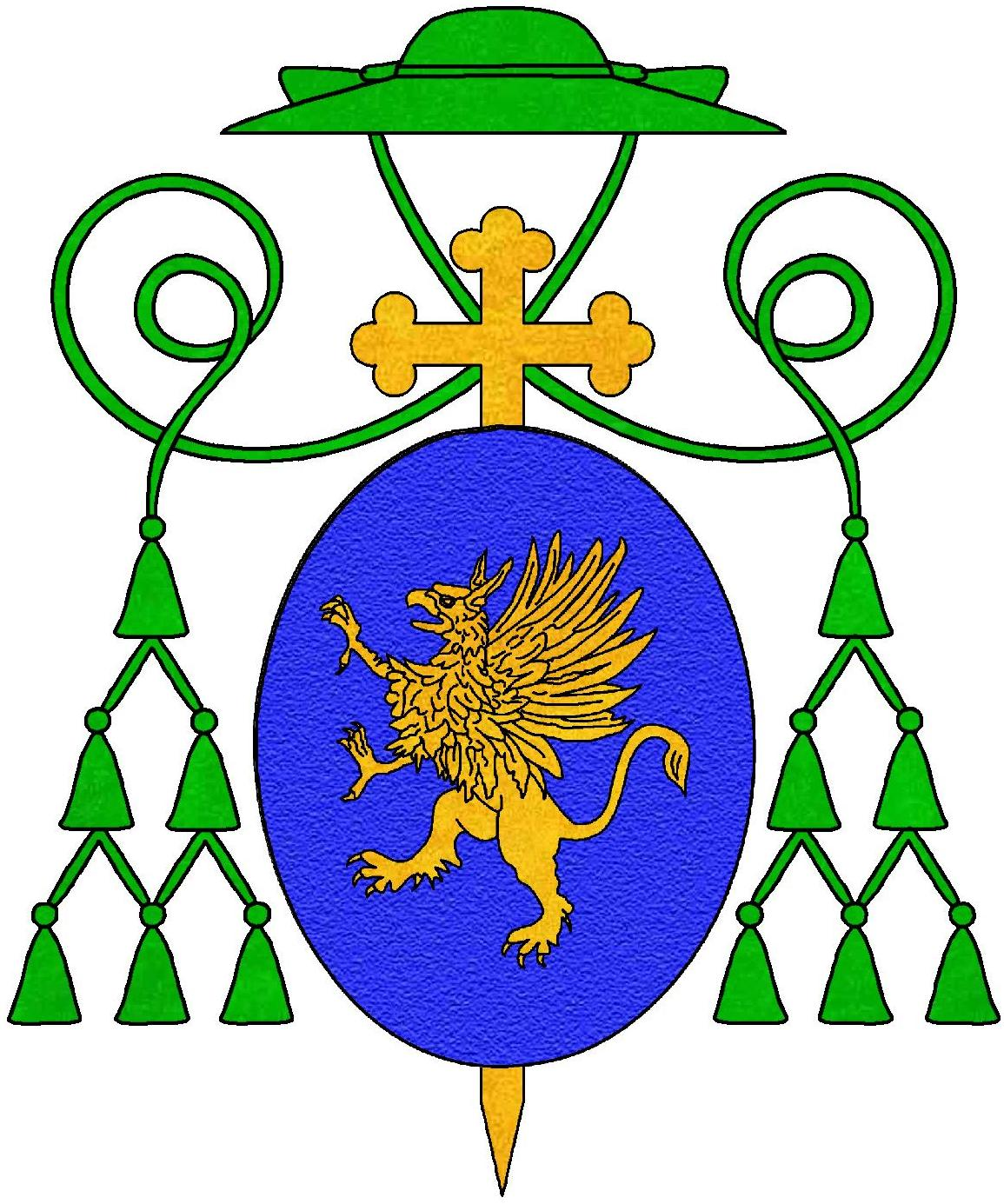 Stemma del vescovo Giovanni di Fiumicello